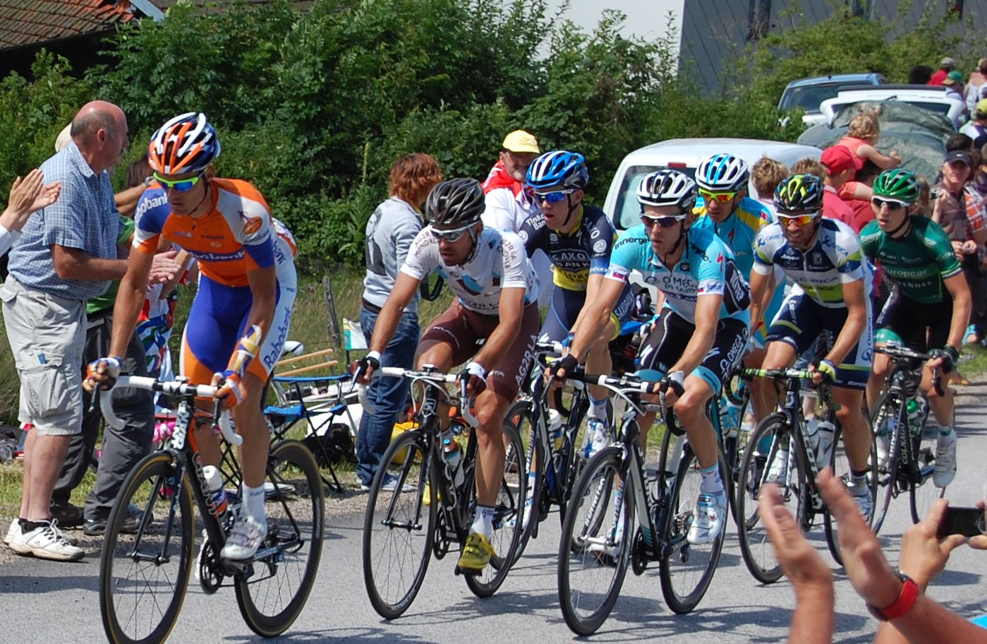 Les 7 échappés de la 7e étape du Tour de France 2012 dans le bas de l'ascension du col de Grosse Pierre : dans l'ordre, Luis León Sánchez (Rabobank), Christophe Riblon (AG2R La Mondiale), Martin Velits (Omega Pharma-Quick Step), Chris Anker Sørensen (Saxo Bank-Tinkoff Bank), Michael Albasini (Orica-GreenEDGE), Dmitriy Fofonov (Astana) et Cyril Gautier (Europcar)